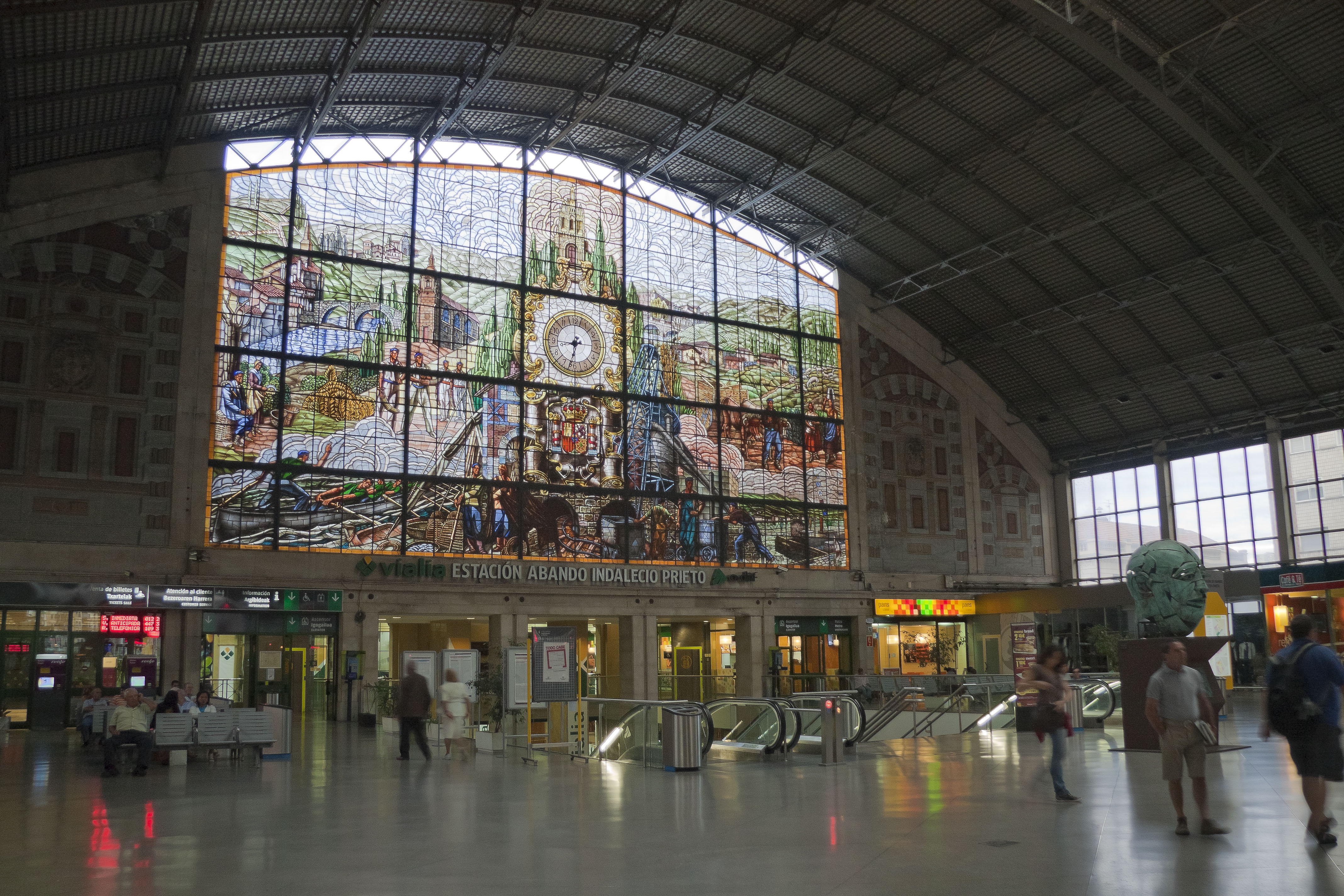 Abando train station - Bilbao